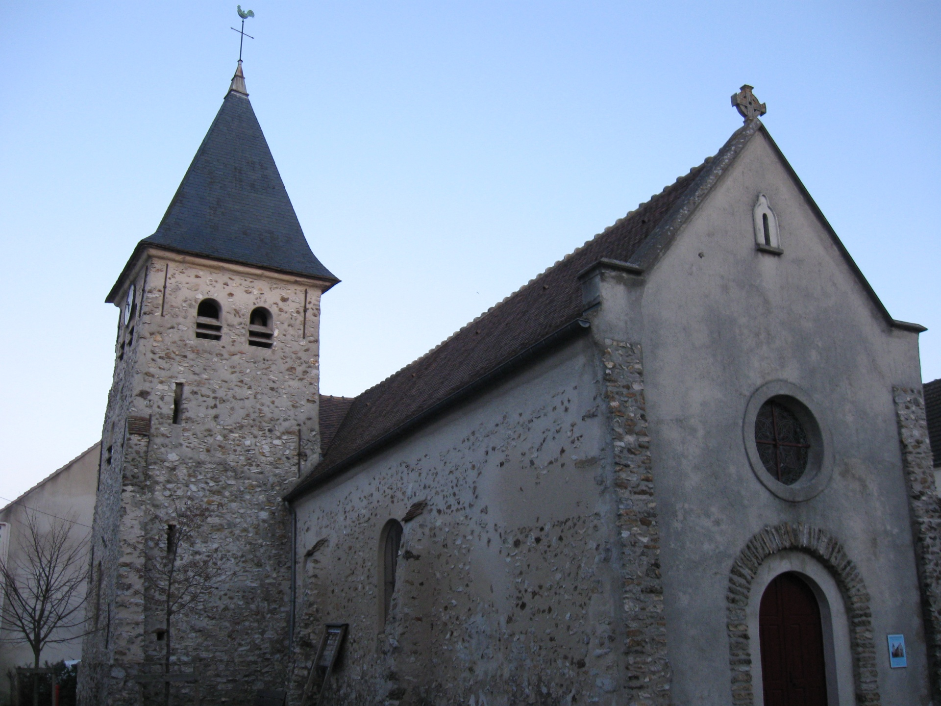 Église Saint-Antoine de Carnetin. (Seine-et-Marne, région Île-de-France).